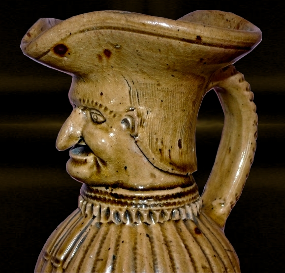 Pichet par Marie Talbot, La Borne, France fin XIXe